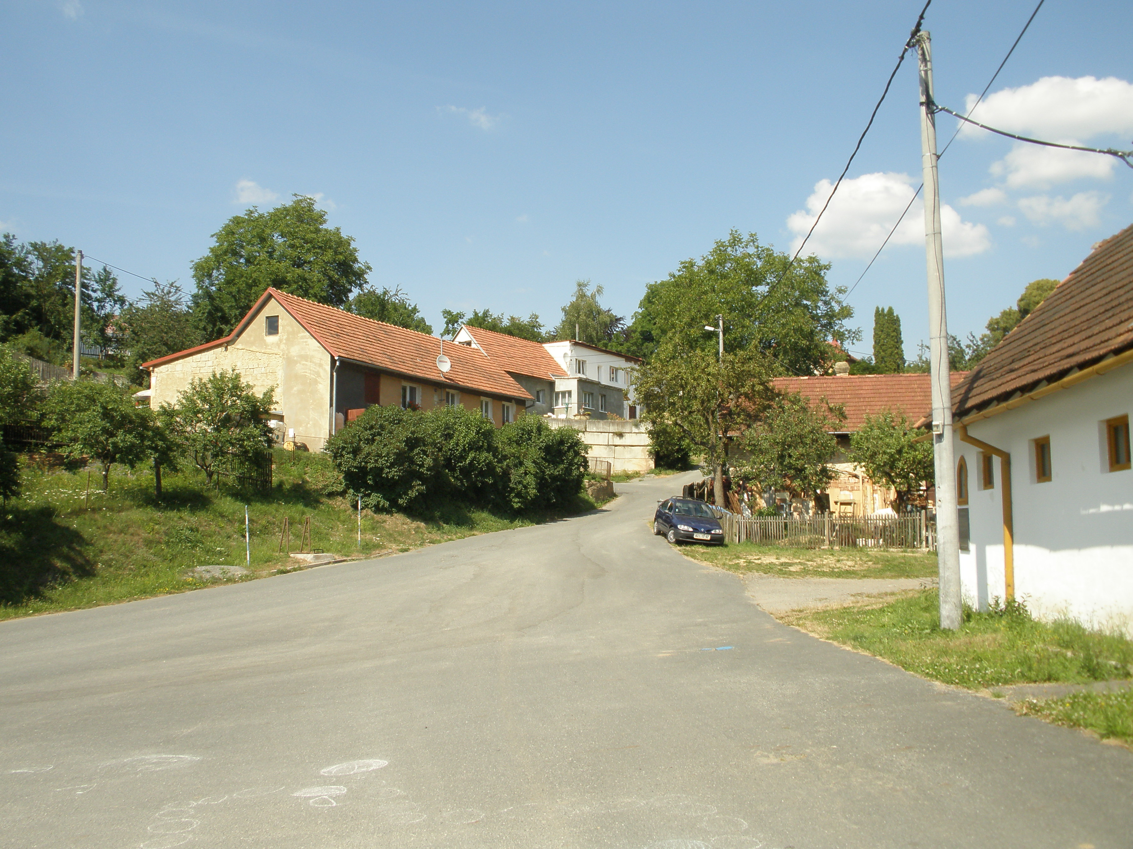 Jasinov